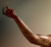 Particolare di questo file caricato su commons: File:Netuno19b.jpg